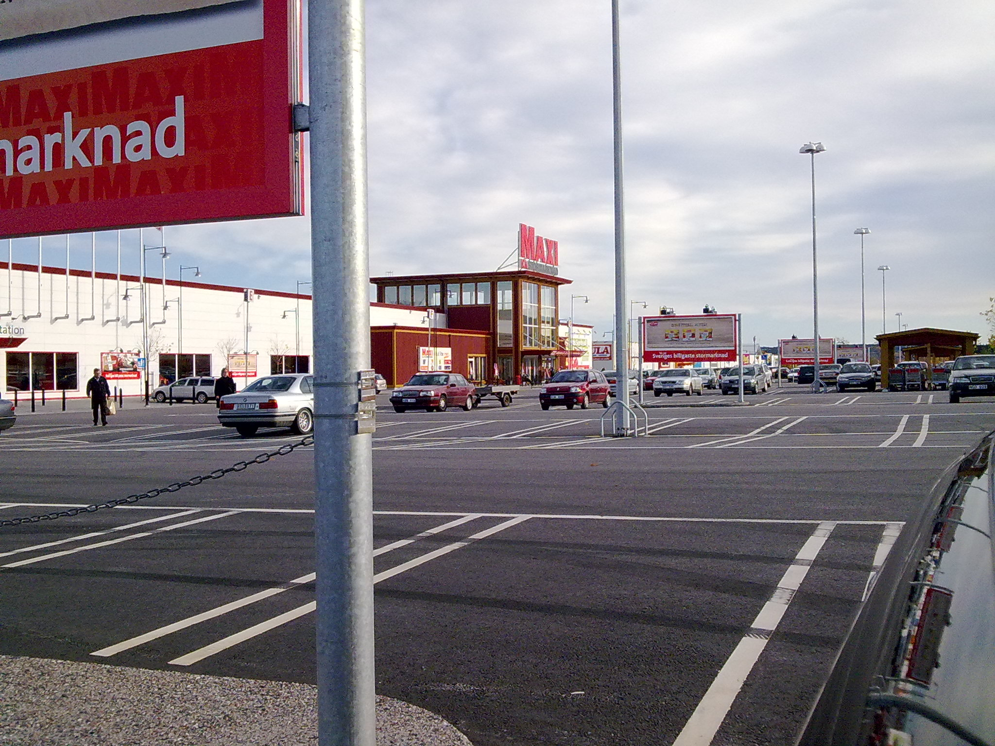 Ica Maxi Birsta / Sundsvall